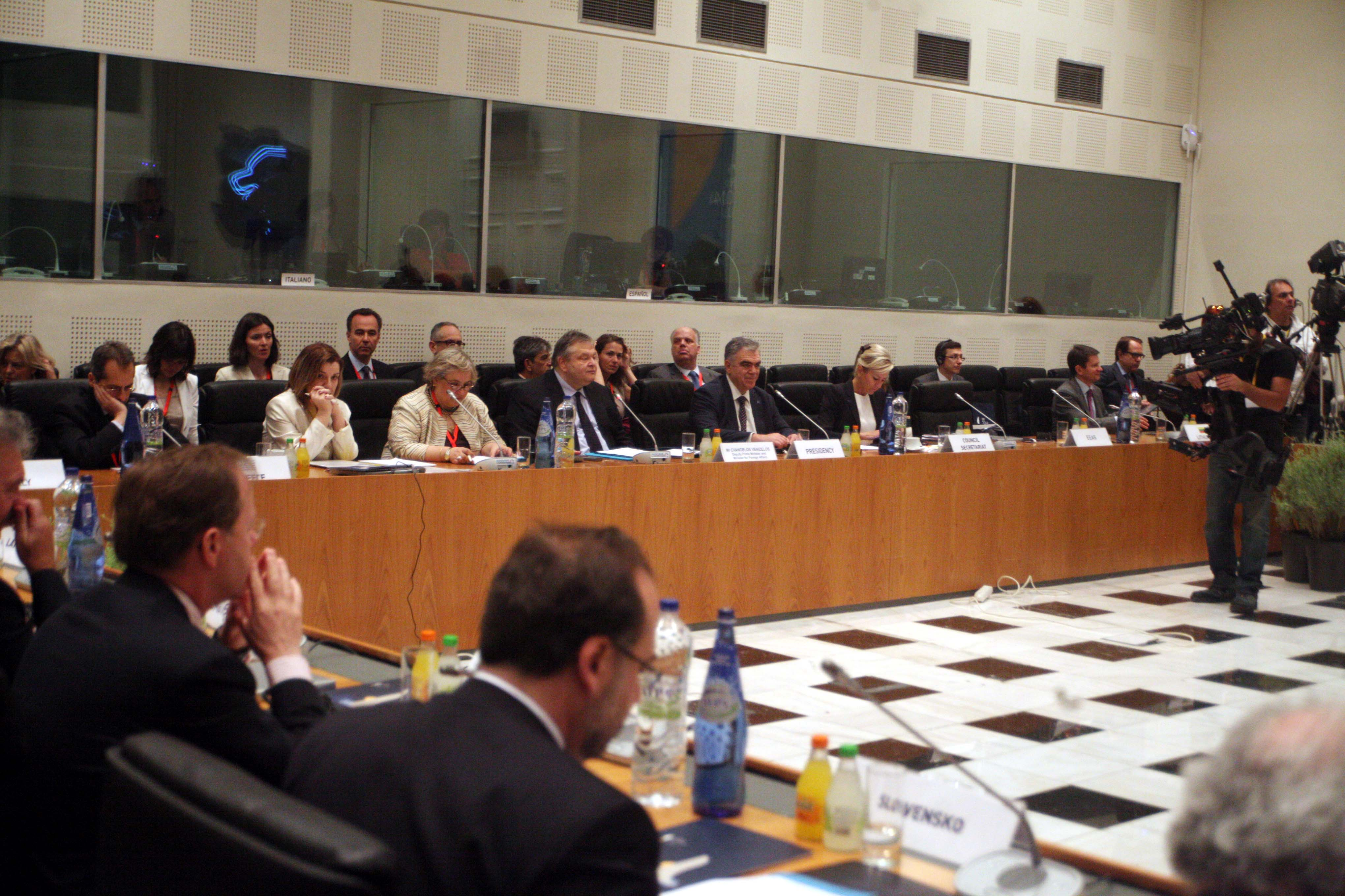 Ο Αντιπρόεδρος της Κυβέρνησης και Υπουργός Εξωτερικών, Ευάγγελος Βενιζέλος, απηύθηνε εναρκτήρια ομιλία στο άτυπο Συμβούλιο Γενικών Υποθέσεων της Ευρωπαϊκής Ένωσης, το οποίο πραγματοποιήθηκε στο Ζάππειο Μέγαρο, στις 30 Μαΐου 2014, στο πλαίσιο της Ελληνικής Προεδρίας του Συμβουλίου της ΕΕ. Πηγή: ΕΥΡΩΚΙΝΗΣΗ